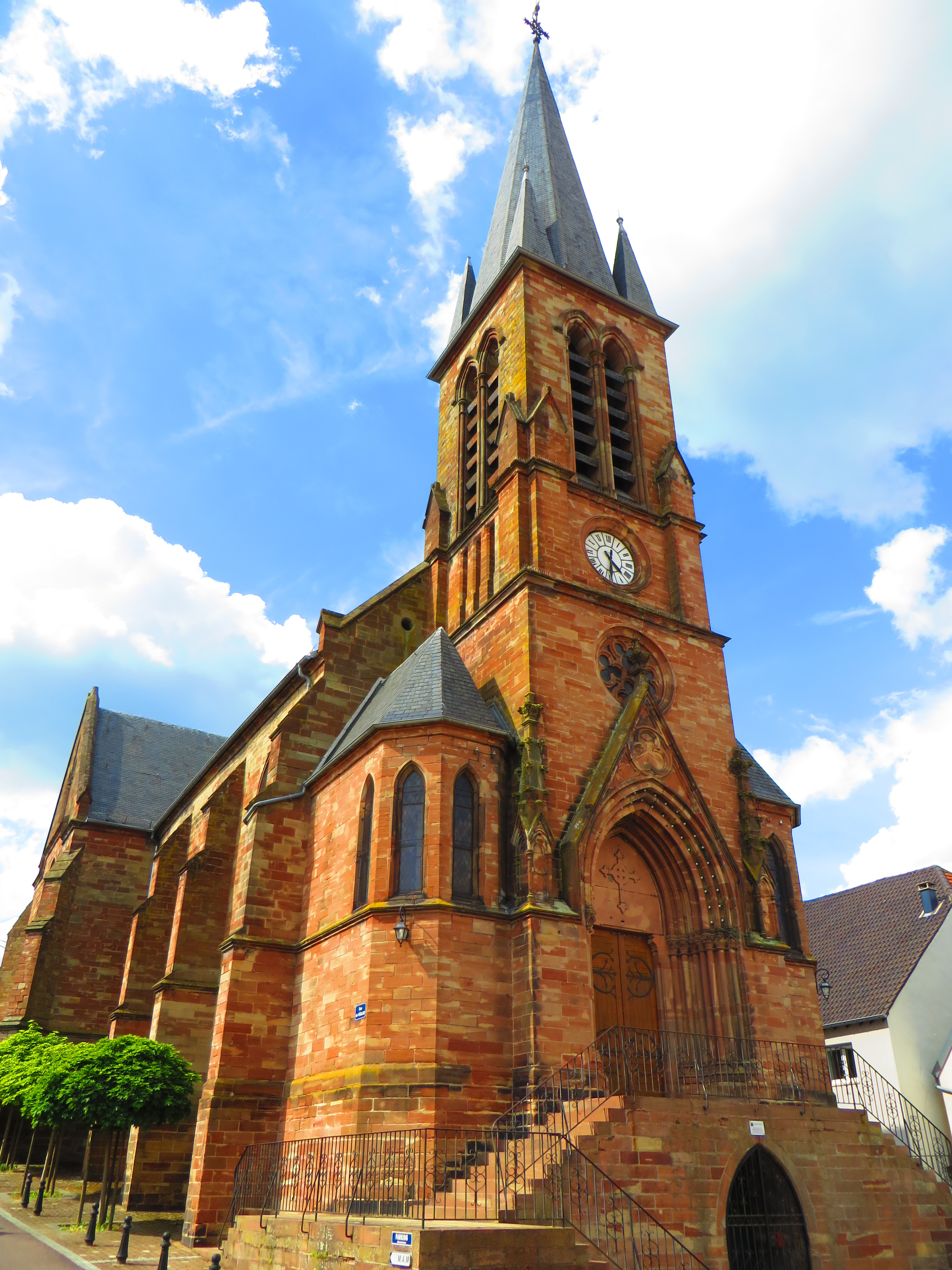 Etzling Église Saint-Hubert